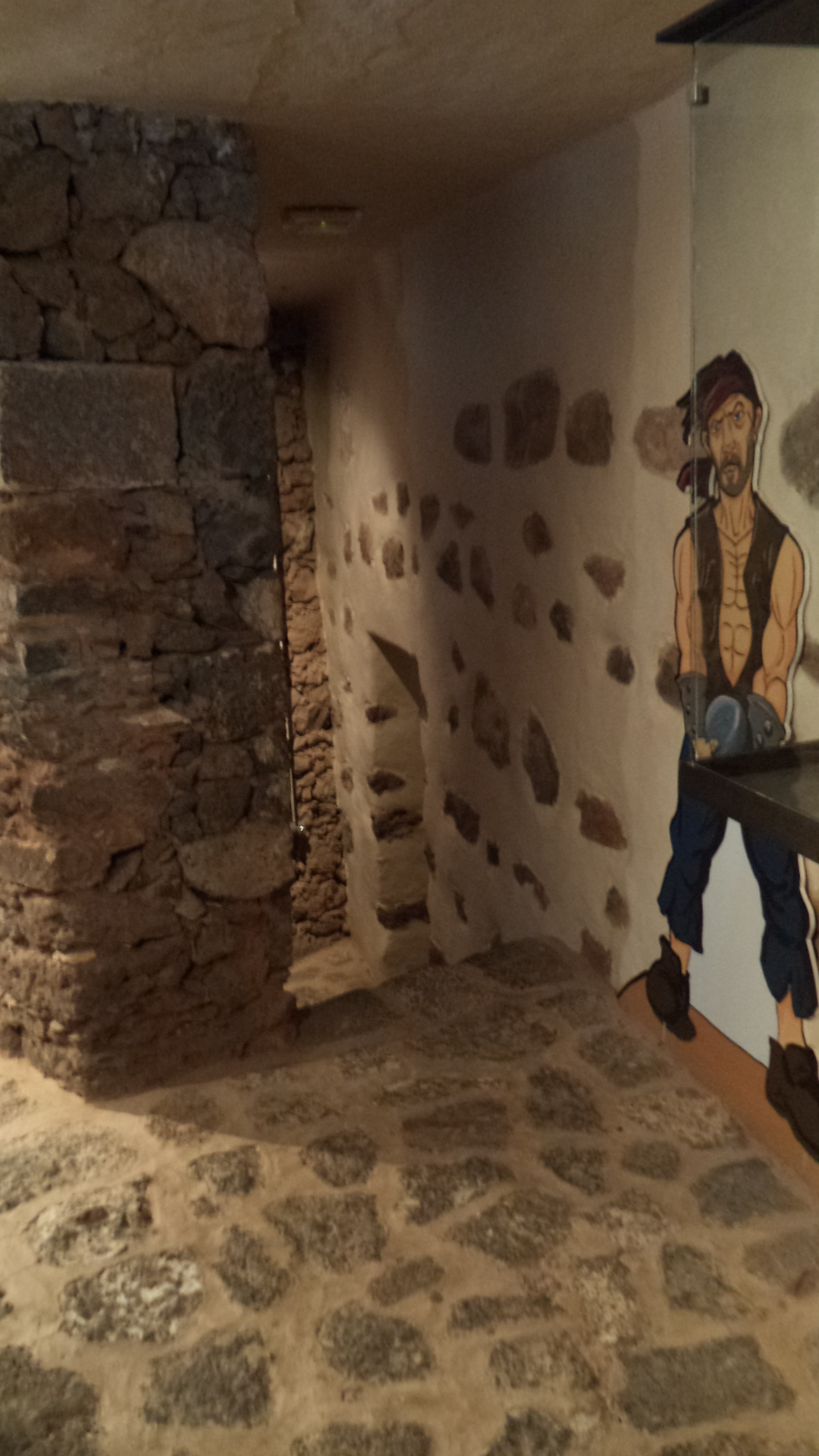 Sala del Castillo de Santa Bárbara de Lanzarote desde 2011 destinado a ser Museo de la Piratería